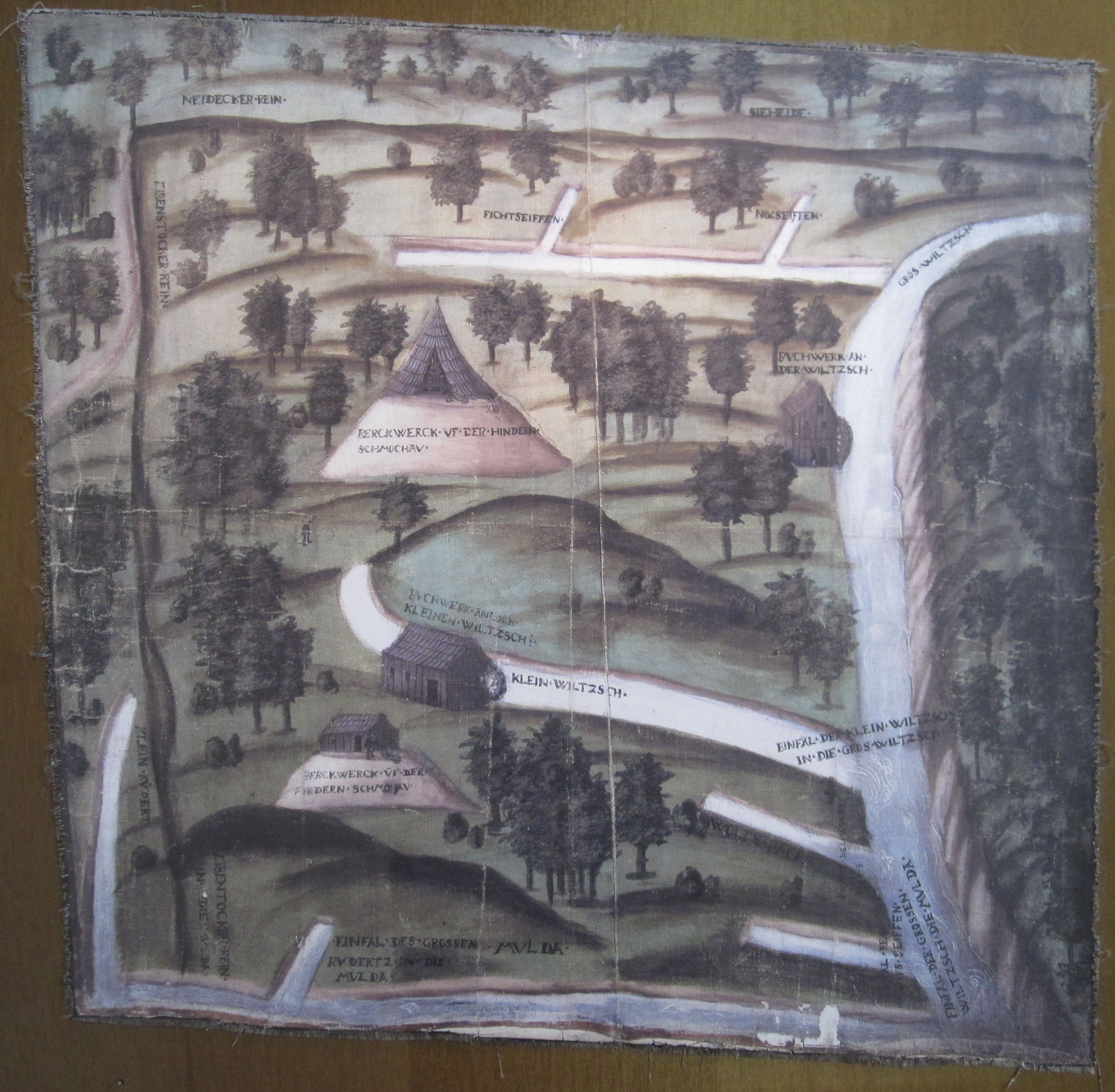 Eibenstock. Bildkarte der Bergwerke Vordere und Hintere Schmochau bei Eibenstock, um 1520. Auch Details aus der Bildkarte. Sächsisches Staatsarchiv – Bergarchiv Freiberg Nr. K 9390, ausgestellt in den musealen Räumen des Bergarchivs im Erdgeschoß des Schlosses Freudenstein in Freiberg. Der dortige Erläuterungstext zu der auf Textilgewebe gemalten Karte lautet: „Die Bildkarte ist die älteste Darstellung von Bergbauanlagen im Bergarchiv Freiberg. Es handelt sich um eine Ansicht des bedeutenden Zinnbergbaugebietes südwestlich der Bergstadt Eibenstock im Westerzgebirge. Zu den bekanntesten und ertragreichsten Gruben im Umfeld der erst später gegründeten Ortschaft Carlsfeld gehörten die Gruben ‚Fleschmaul‘, ‚Spindel‘, ‚Rosszeche‘ und ‚Schmuge‘. Die auf der Karte dargestellten Bergwerke ‚Vordere und Hintere Schmo(c)hau‘ mit den dazugehörigen Aufbereitungsanlagen können durchaus mit den bei Georg Agricola erwähnten Bergwerken ‚Alte und Junge Schmuge‘ identisch sein. Vermutlich steht die Anfertigung dieser Karte im Zusammenhang mit der Darstellung von bergrechtlichen Grenzen.“ Auf der Karte sind auch dargestellt die beiden Bäche Wolfseifenbach und Wölflebächel, die in Wilzschmühle in die Wilzsch münden, der erstere von rechts, der zweite von links kommend. Die Kartendarstellung ist also nicht richtig. Oder war es 1520 anders?